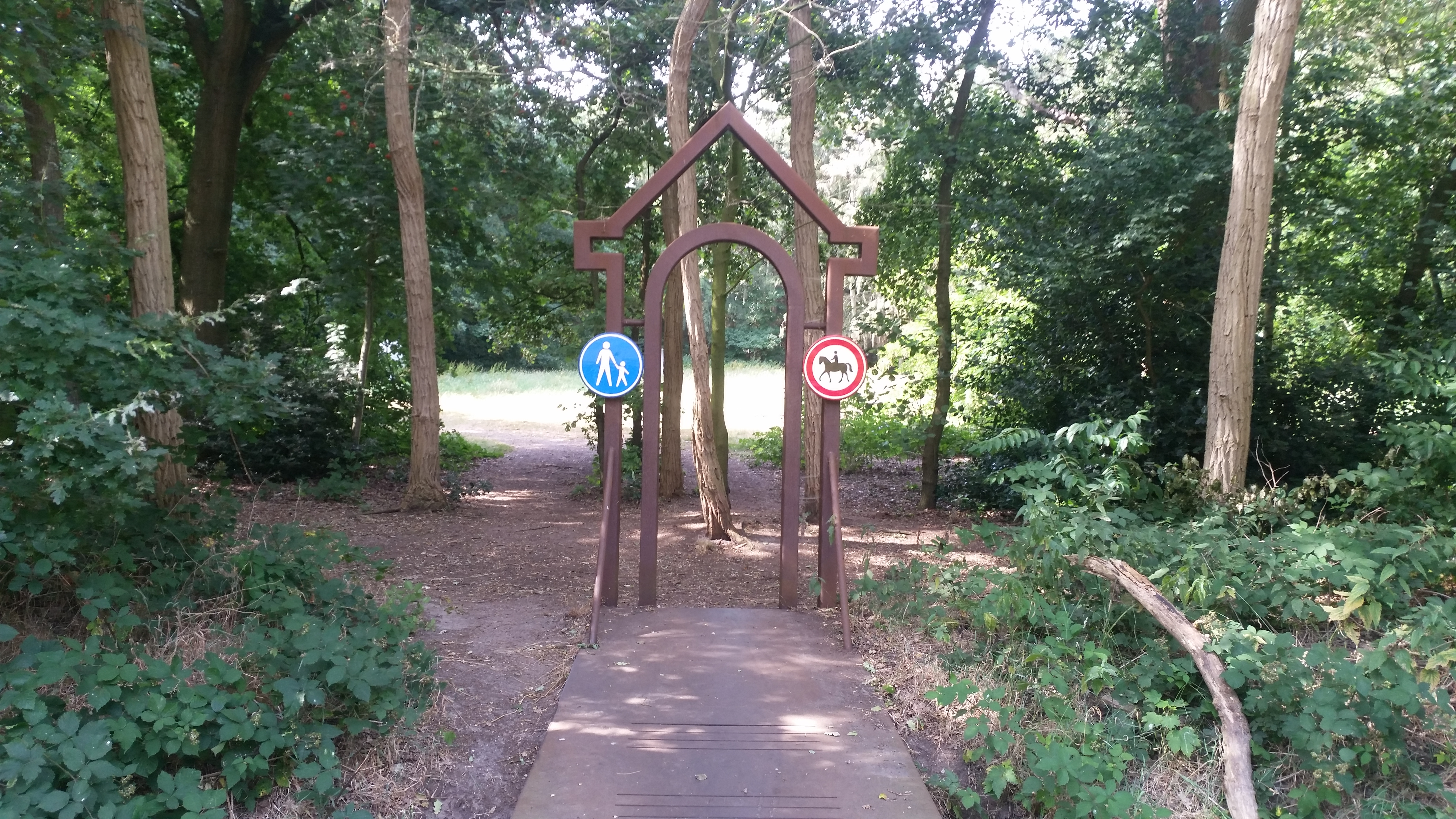 Echobos, Muiderberg, toegangspoort Dijkweg